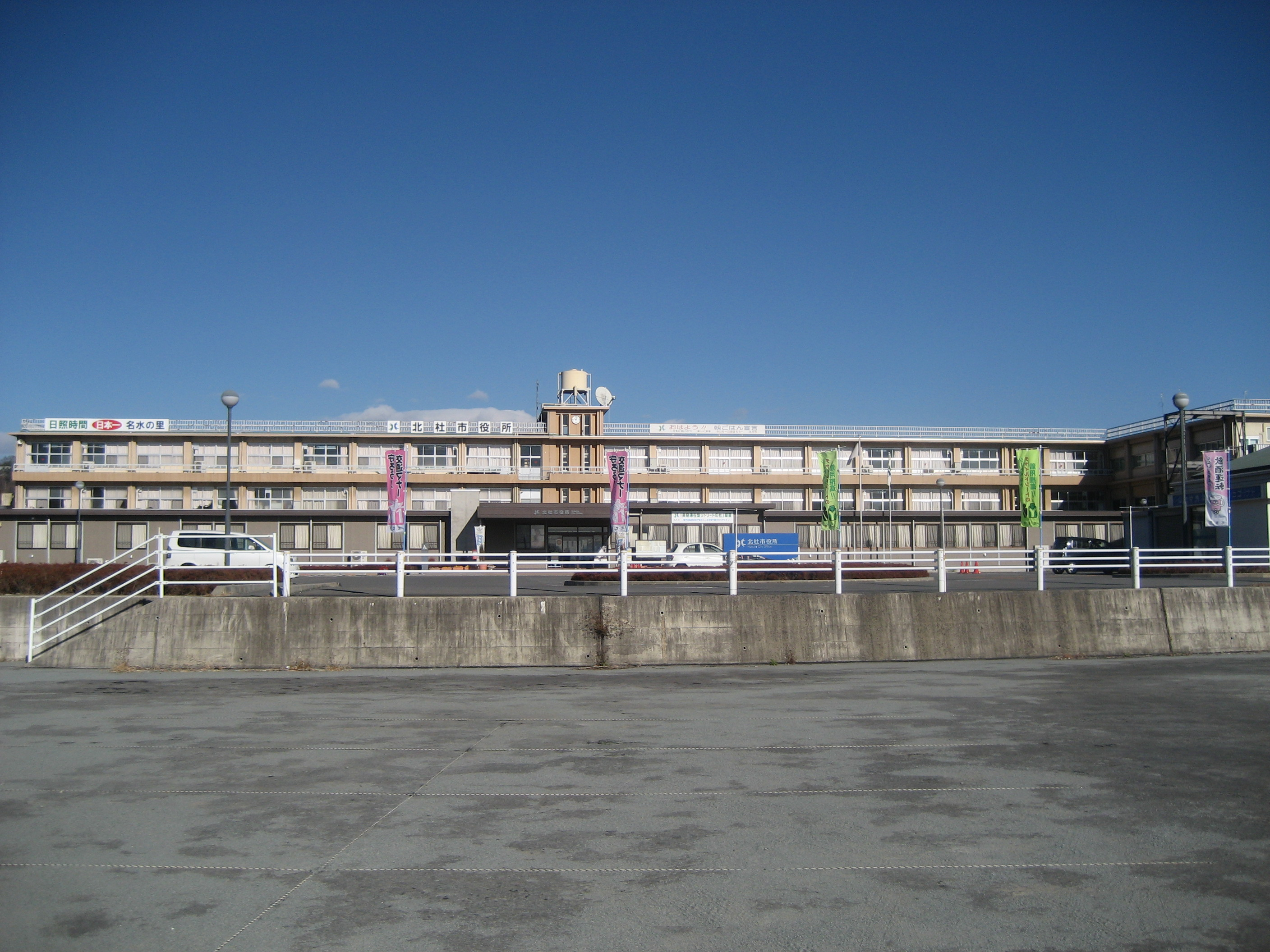 山梨県北杜市役所庁舎